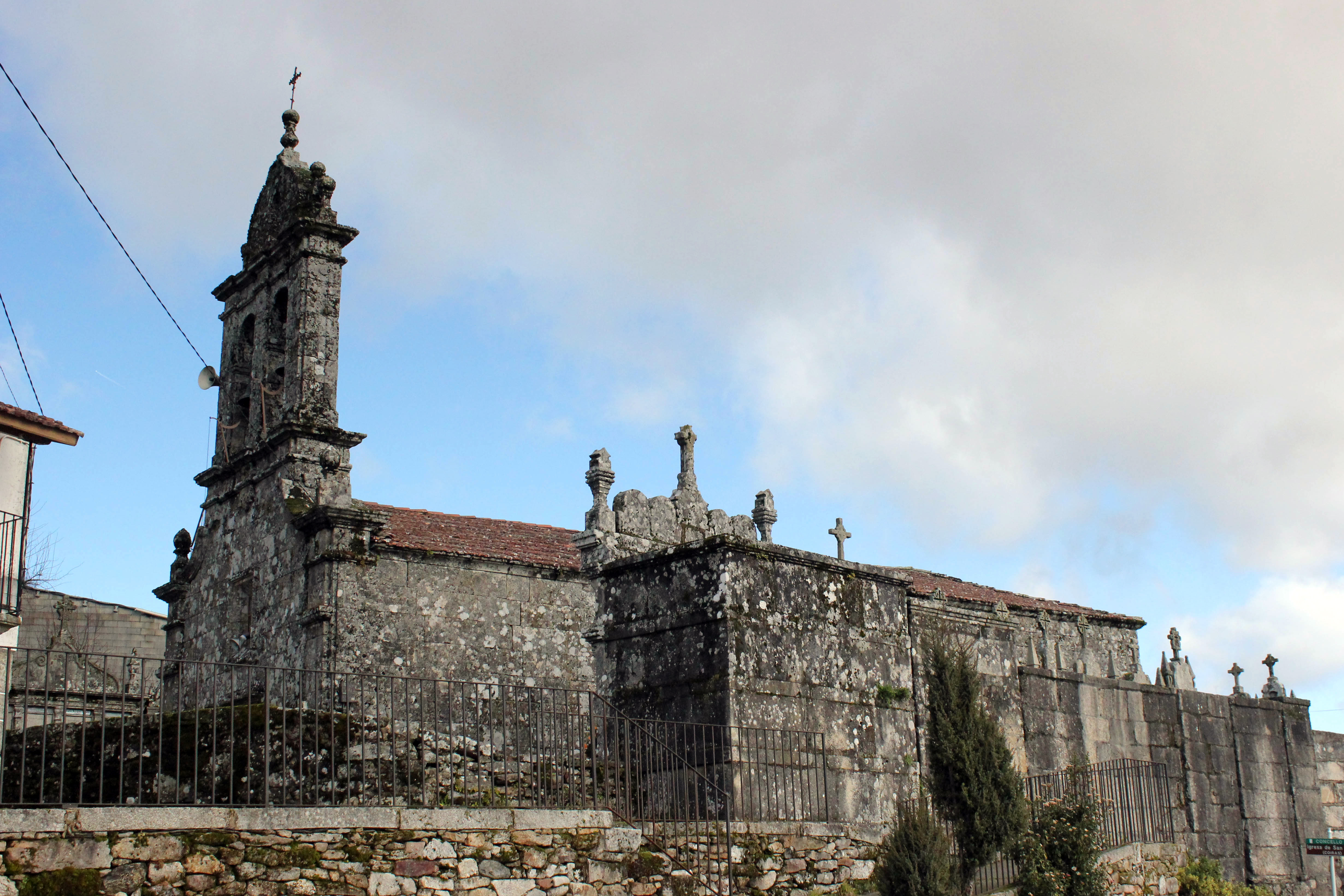 Igrexa de San Xoán de Coiras, no concello da Piñor.